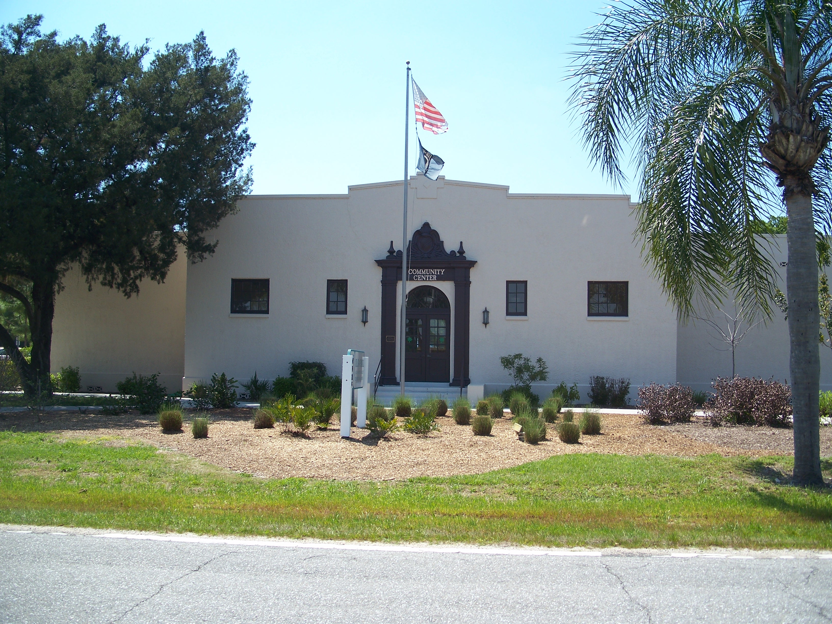 Olga, Florida: Olga School